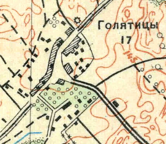 Топографическая карта Ленинградской области, квадрат О-35-23-А-г (Черенковицы), деревня Голятицы